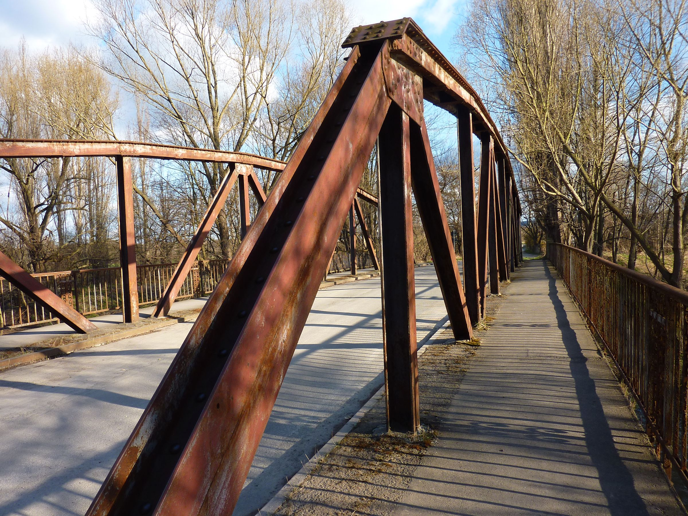 Schafbrücke